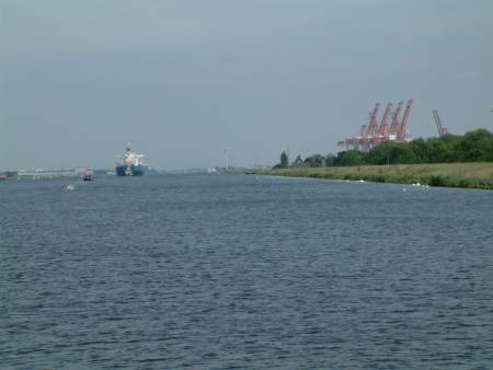 noorzeekanaal (eigen foto)